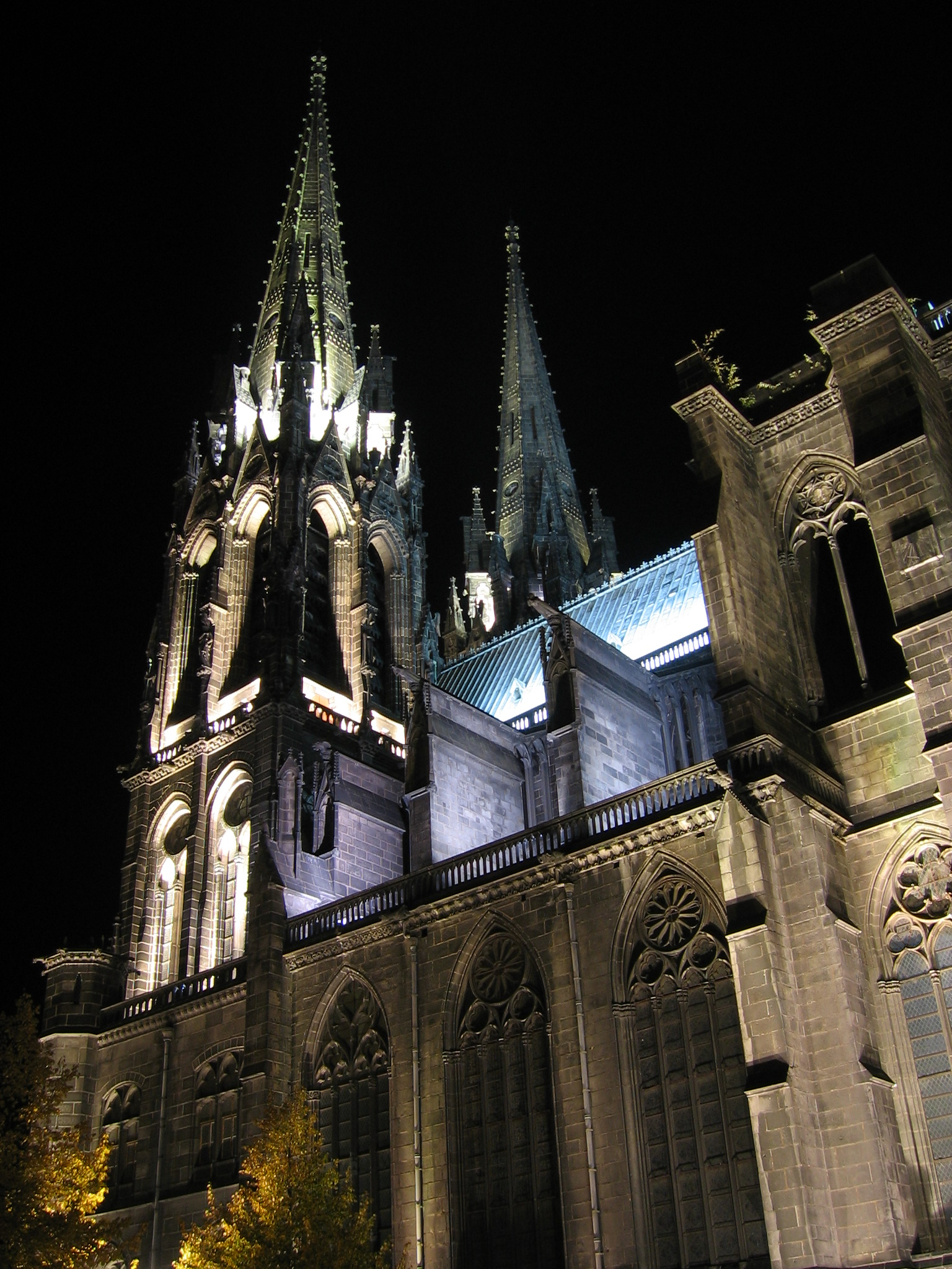 Cathédrale Notre Dame de l'Assomption de Clermont-Ferrand Clermont-Ferrand, Puy-de-Dôme, France